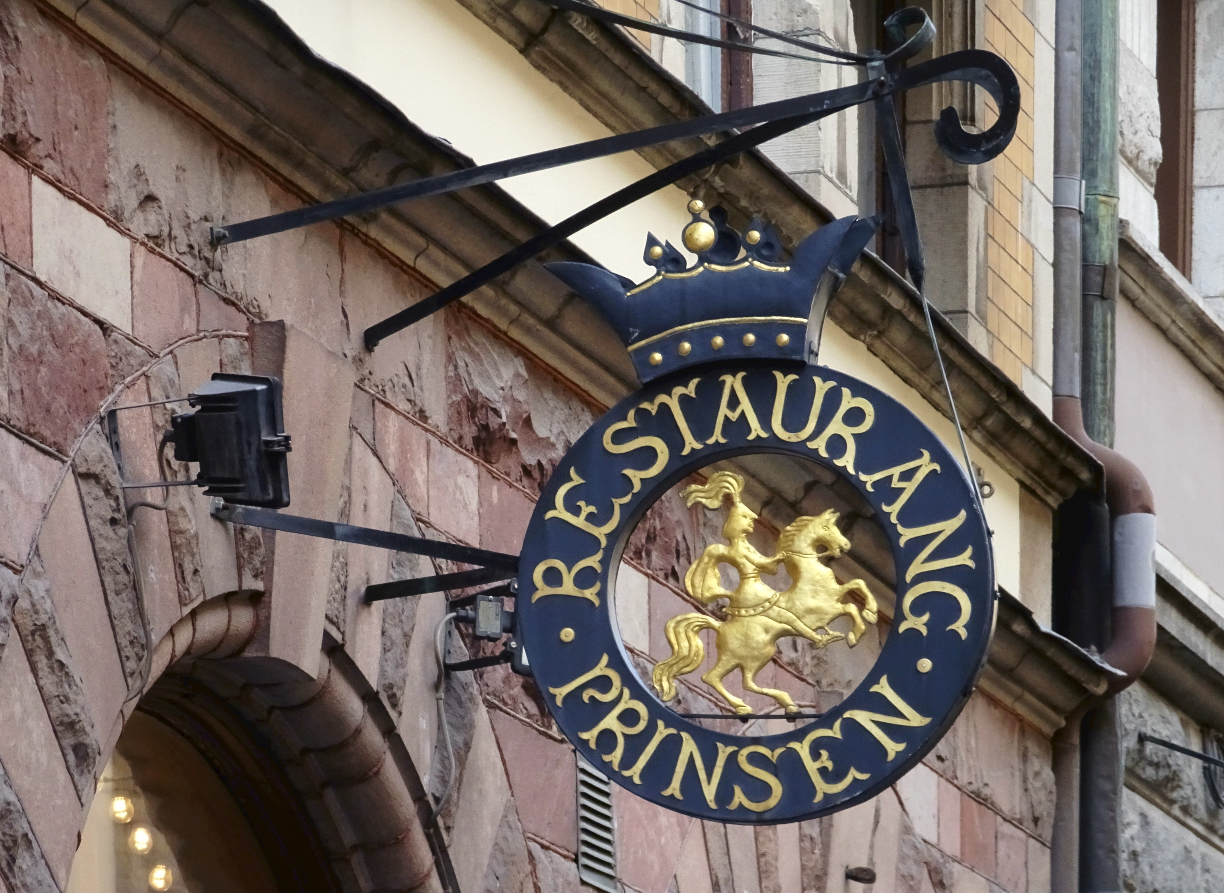 Restaurang Prinsen, Mäster Samuelsgatan 4